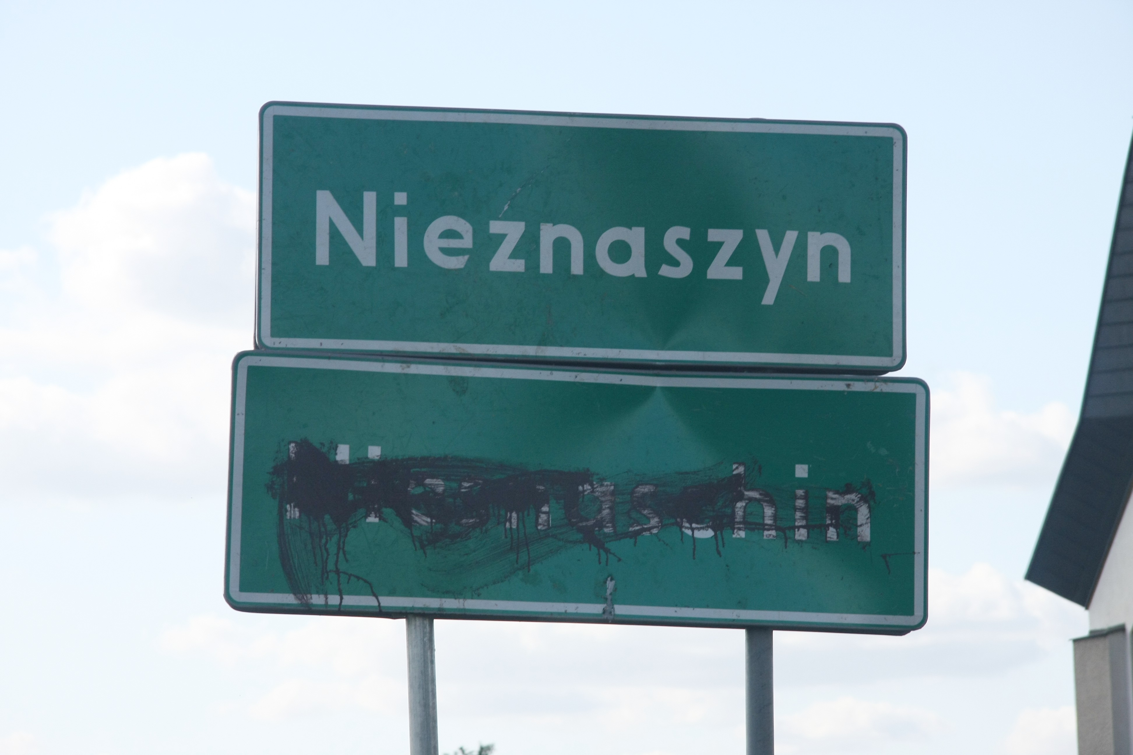 Tablica z nazwą przed wjazdem do Nieznaszyna. Niemiecka nazwa miejscowości (Niesnaschin) została zniszczona